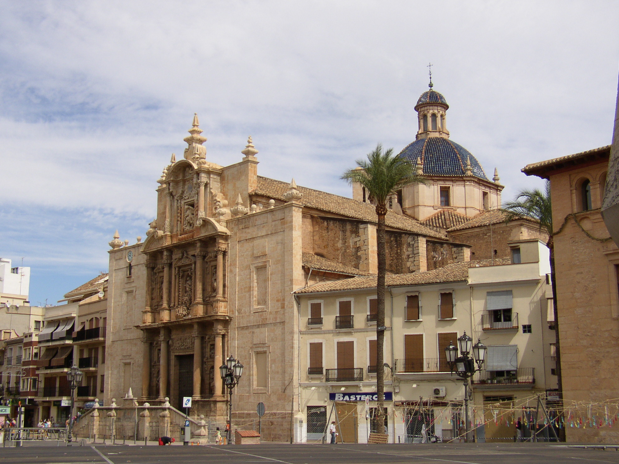 Valencia. (Comunidad Valenciana. España) Liria. Iglesia de la Asunción. SigloXVII . Fotografía realizada el 24 septiembre de 2006 por el autor. User:Pelayo2